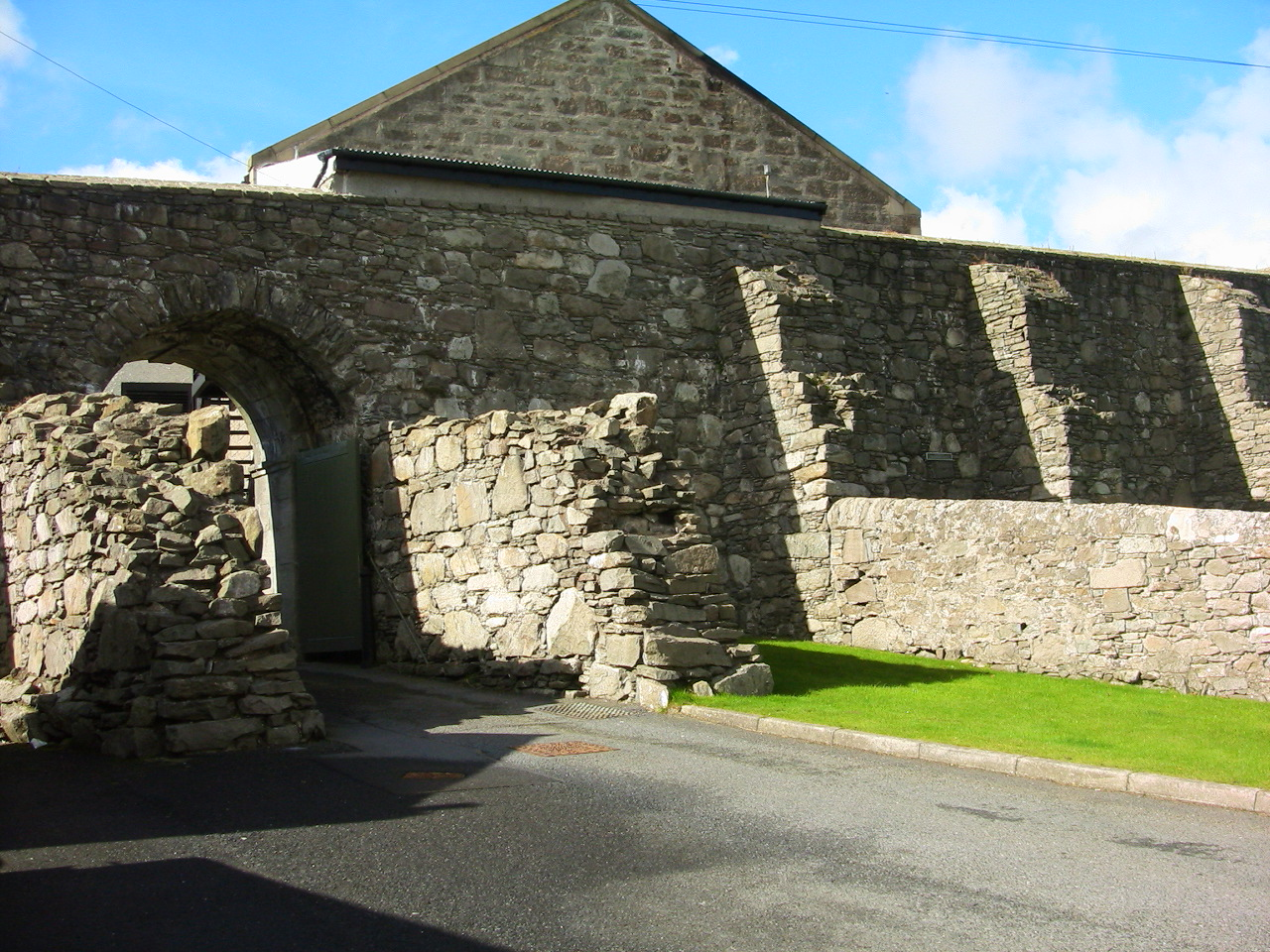 Vue orientale du fort Charlotte situé à Lerwick, dans les Shetlands, en Écosse.